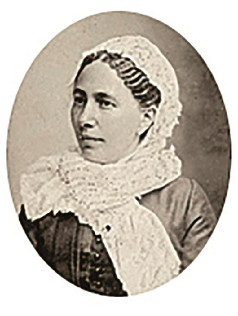 Jacoba Rauwerda, foto uit 1888